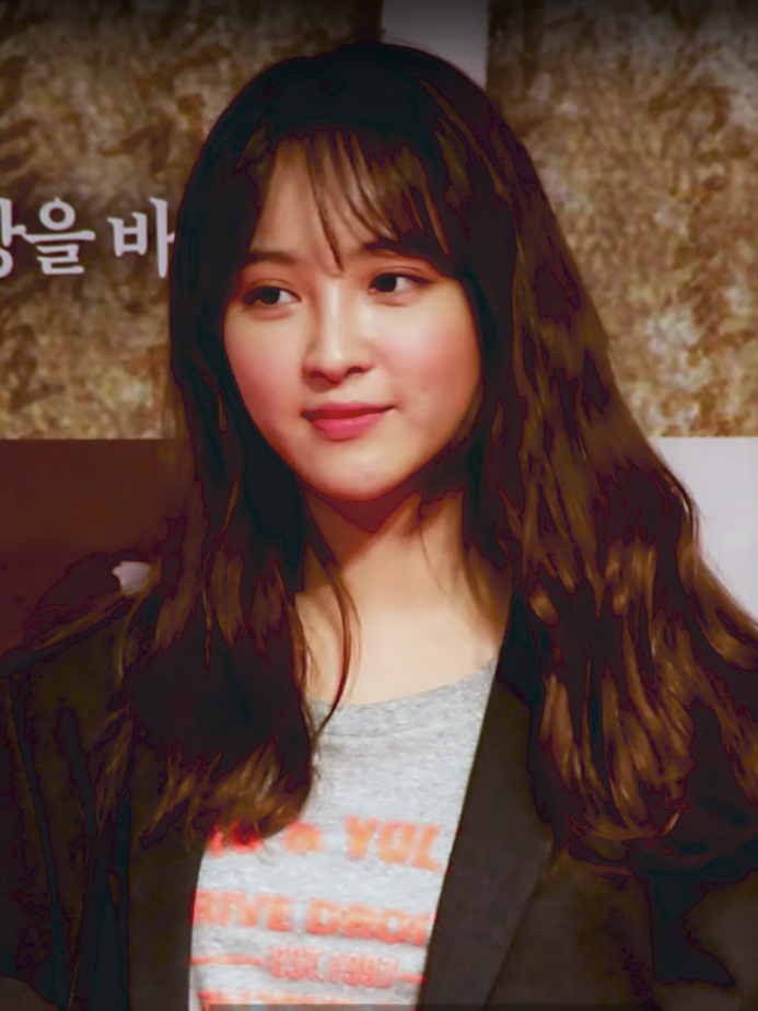 영화 '흥부' VIP시사회 포토월